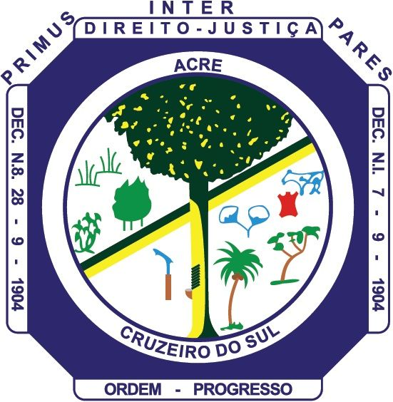 Brasão Oficial de Cruzeiro do Sul, capital do Vale do Juruá, no Acre (Imagem em maior resolução).